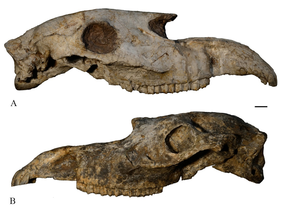 Skull lateral view of Proboscidipparion pater from Yushe Basin, China: A) THP 14312; B) THP 20736. Scale bar = 2 cm.